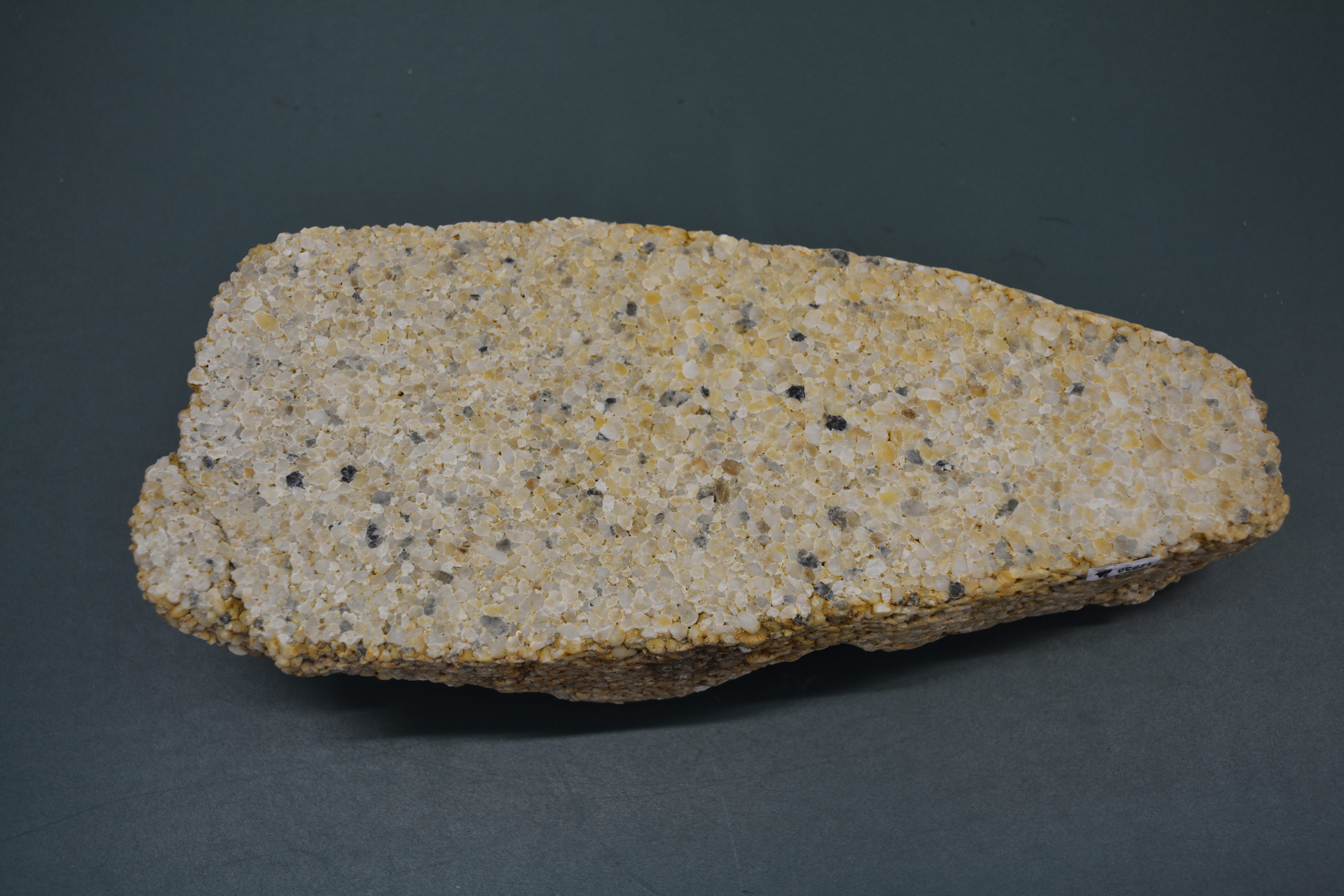 Impressionen einer GLAM on Tour (2018) im Senckenberg Museum für NaturkundeHier: Zum fotografieren bereitgestellte Objekte: Quarzsandstein, verkieselt, matrixarmer, (Diaquarzit)